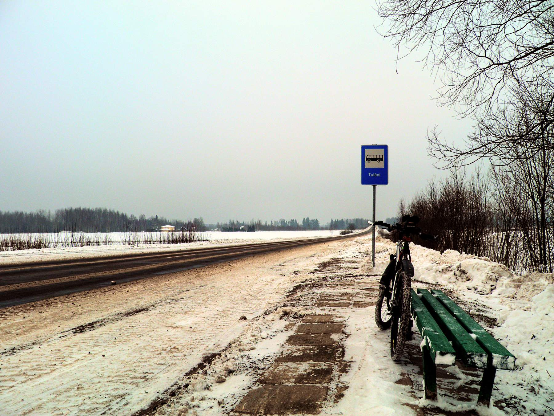 Остановка автобуса, зима Autobusu pietura "Tutāni" ziemā